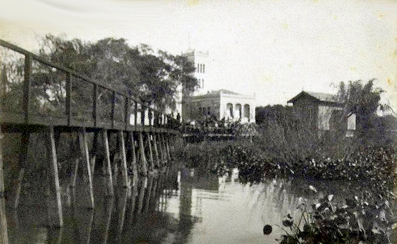 Terceira Casa da Pólvora